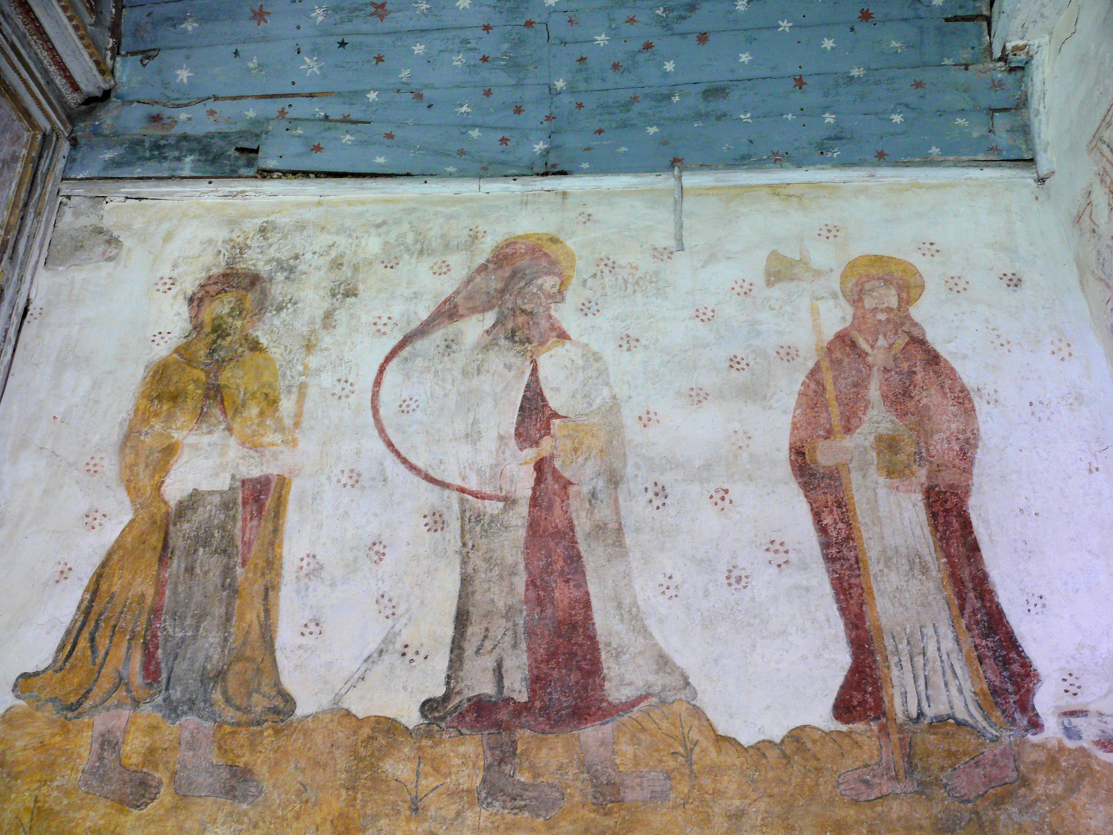 Les Forges - Eglise Saint-Nicolas - Peintures du XIVe siècle dans le choeur - Apôtres